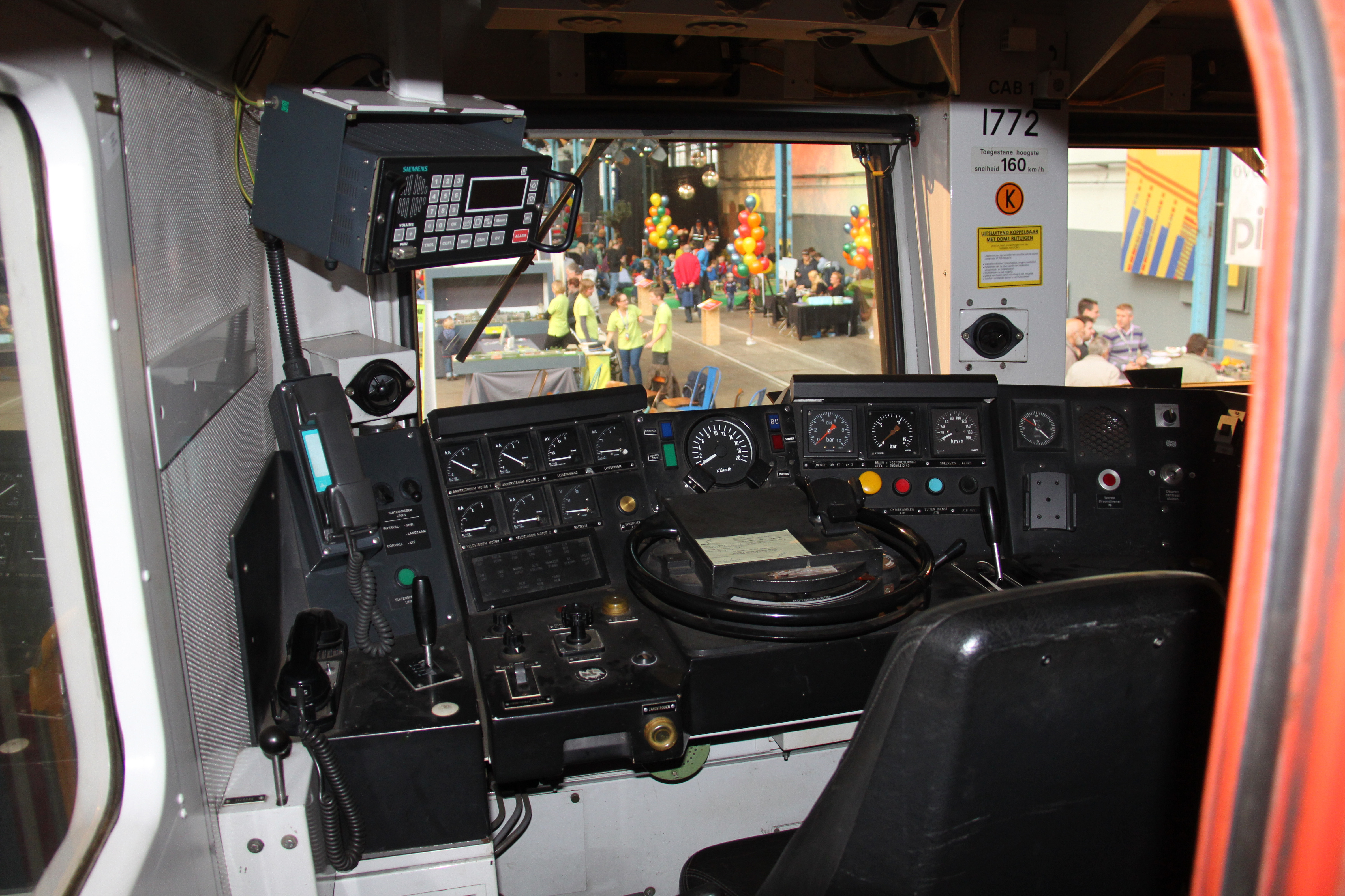 Foto van de cabine van een locomotief uit de 1700-serie tijdens de Spoorparade in Amersfoort.